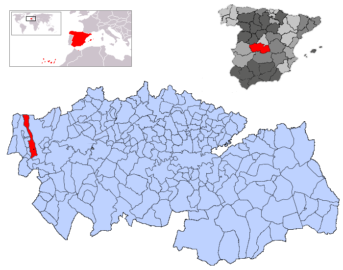 Lagartera en la provincia de Toledo